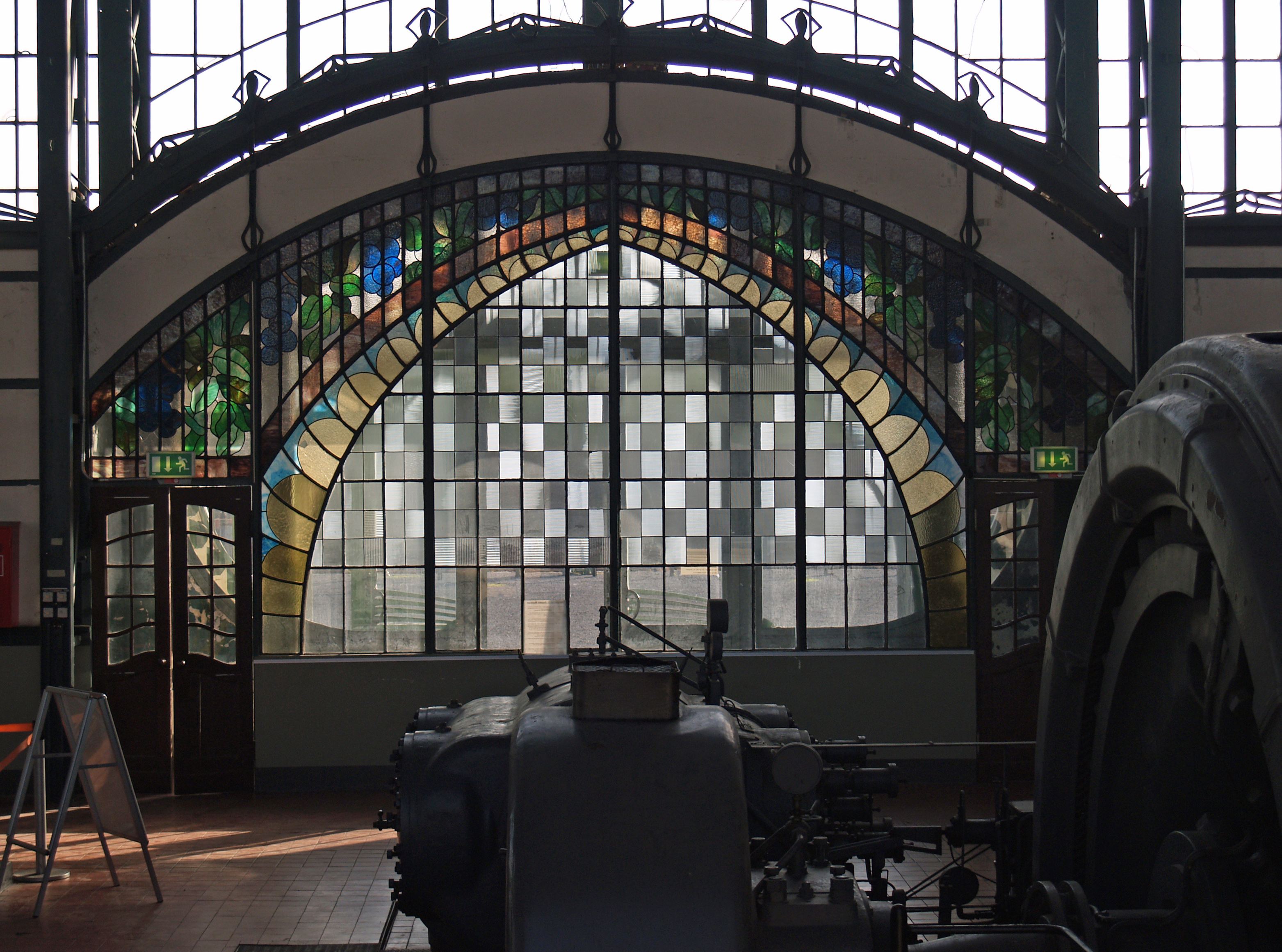 Eingang der Maschinenhalle der Zeche Zollern in Dortmund Bövinghausen